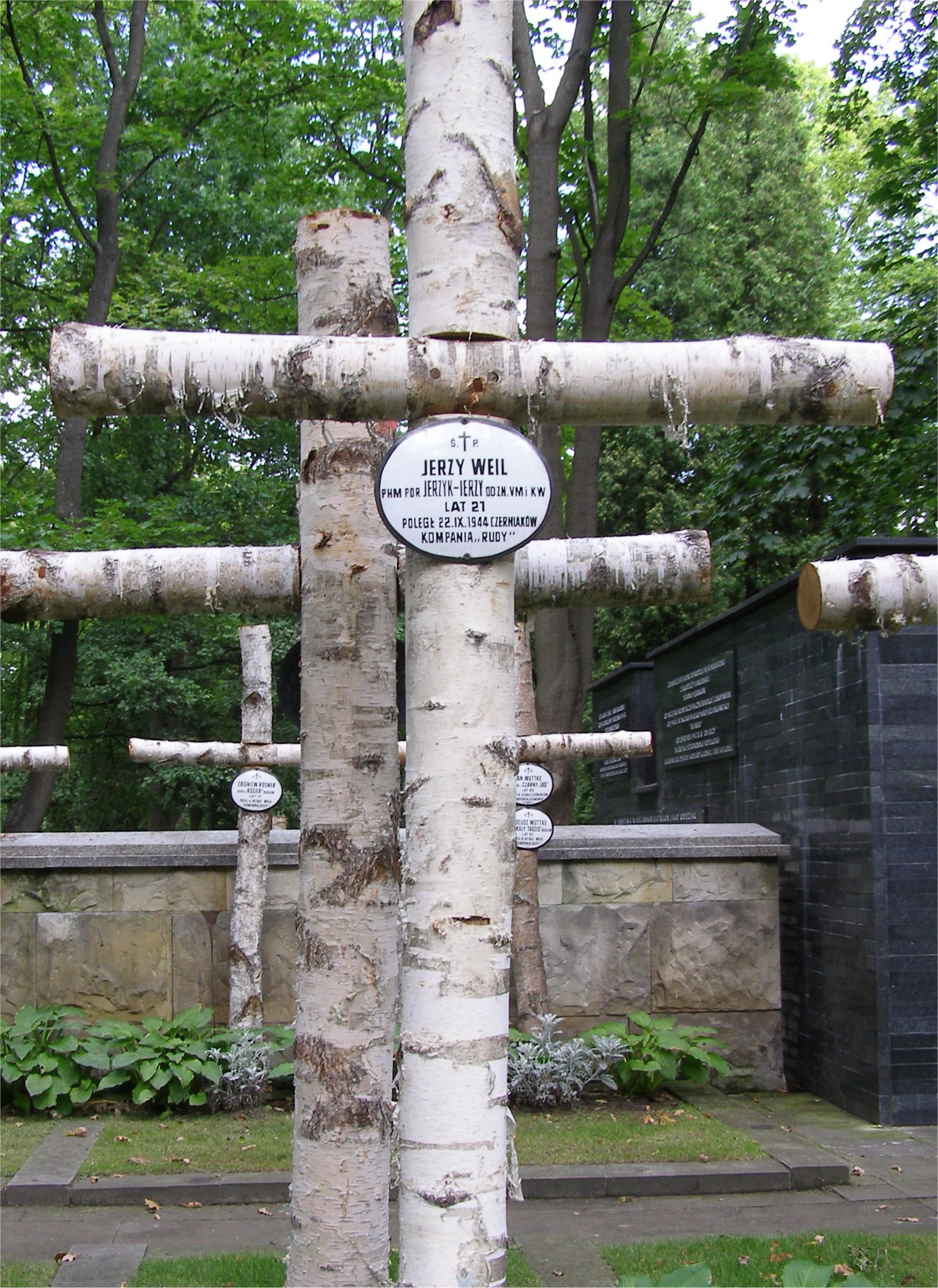 Grób Jerzego Weila na Powązkach Wojskowych w Warszawie (fot Zu)